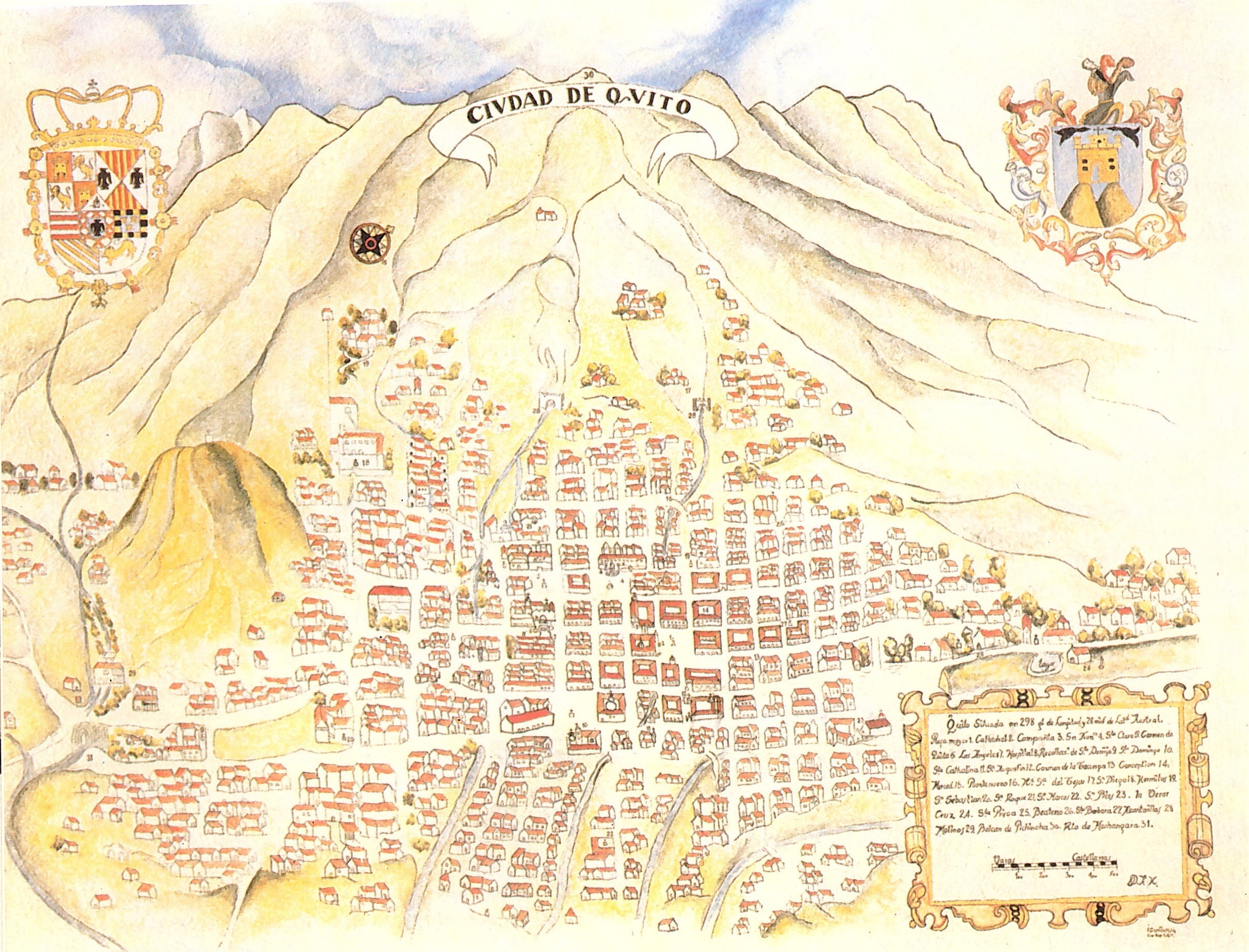 Vargas, José María; Cevallos García, Gabriel y otros investigadores. (1985).Historia del Arte Ecuatoriano Tomo 2. Salvat Editores S.A. Barcelona, España – Quito, Ecuador. Consultado y compartido por J. Javier G. A.